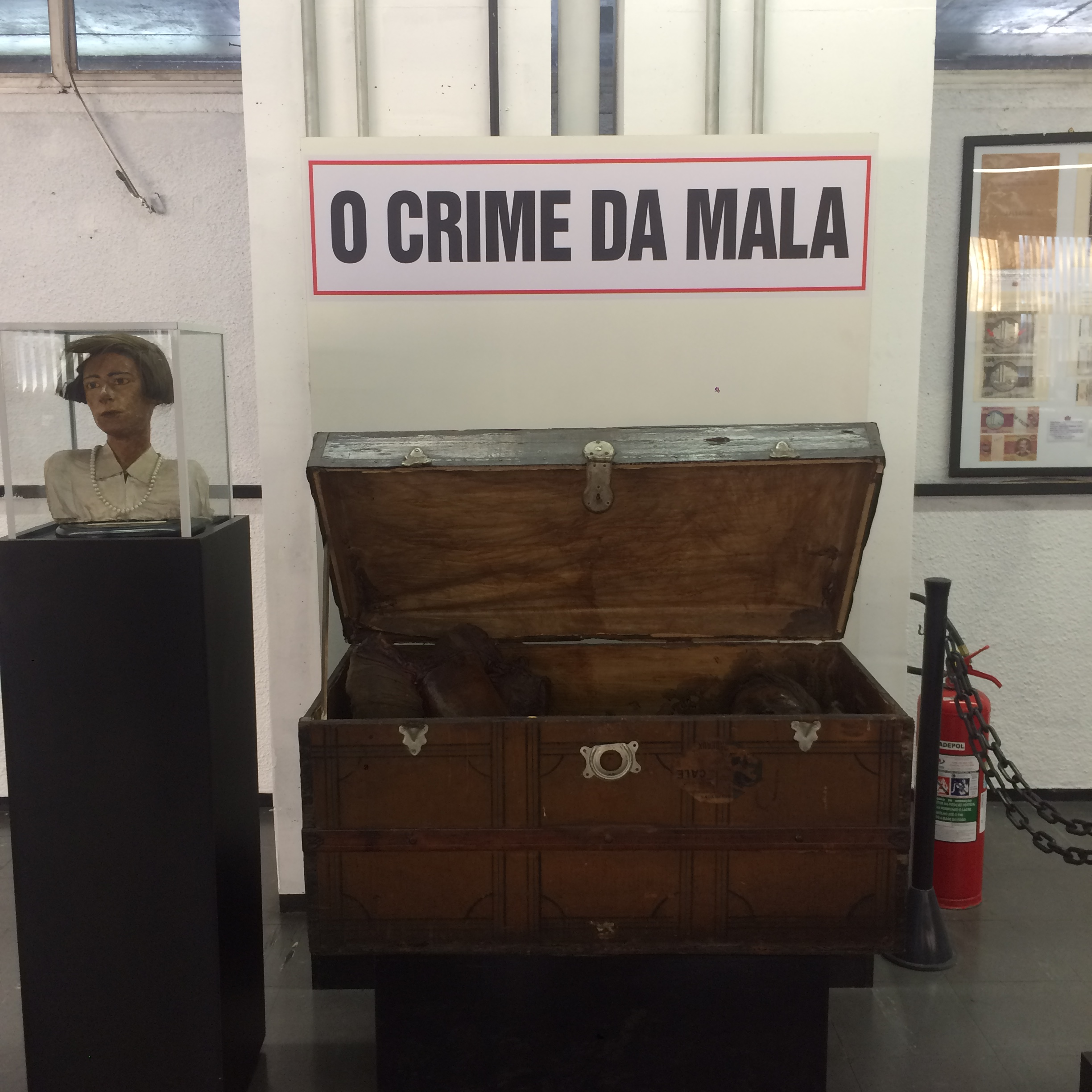 Acervo(peça principal) do Museu da Polícia Civil do Estado de São Paulo.